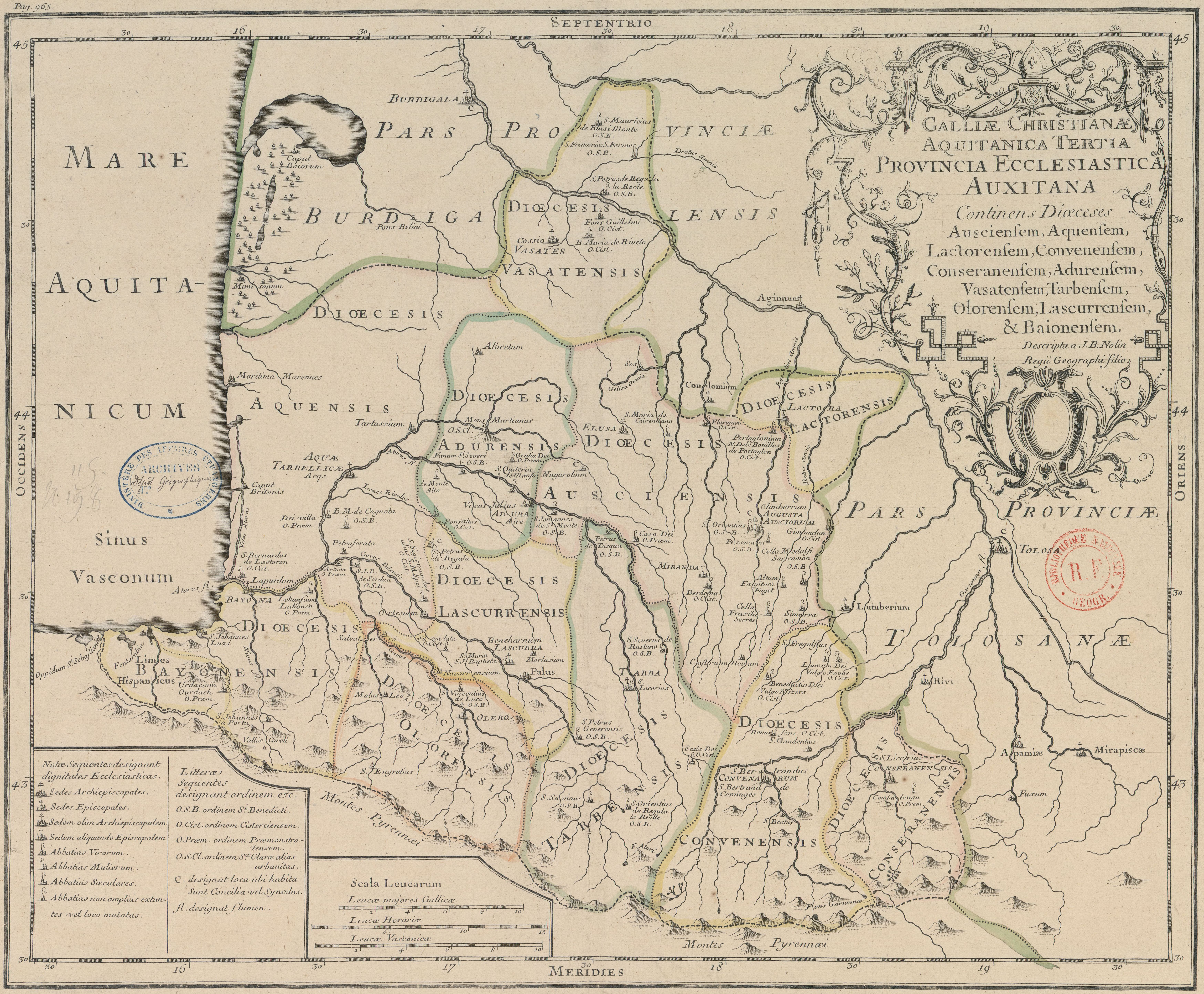 Carte de l'ancienne province ecclésiastique d'Auch, insérée dans le Tome 1 de la Gallia Christiana (1715).